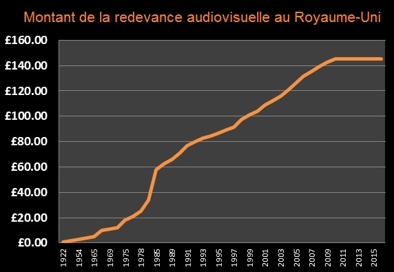 Évolution du montant de la redevance audiovisuelle (incluant la taxe radio)